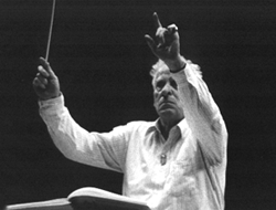 亨利‧梅哲指揮台北愛樂管弦樂團